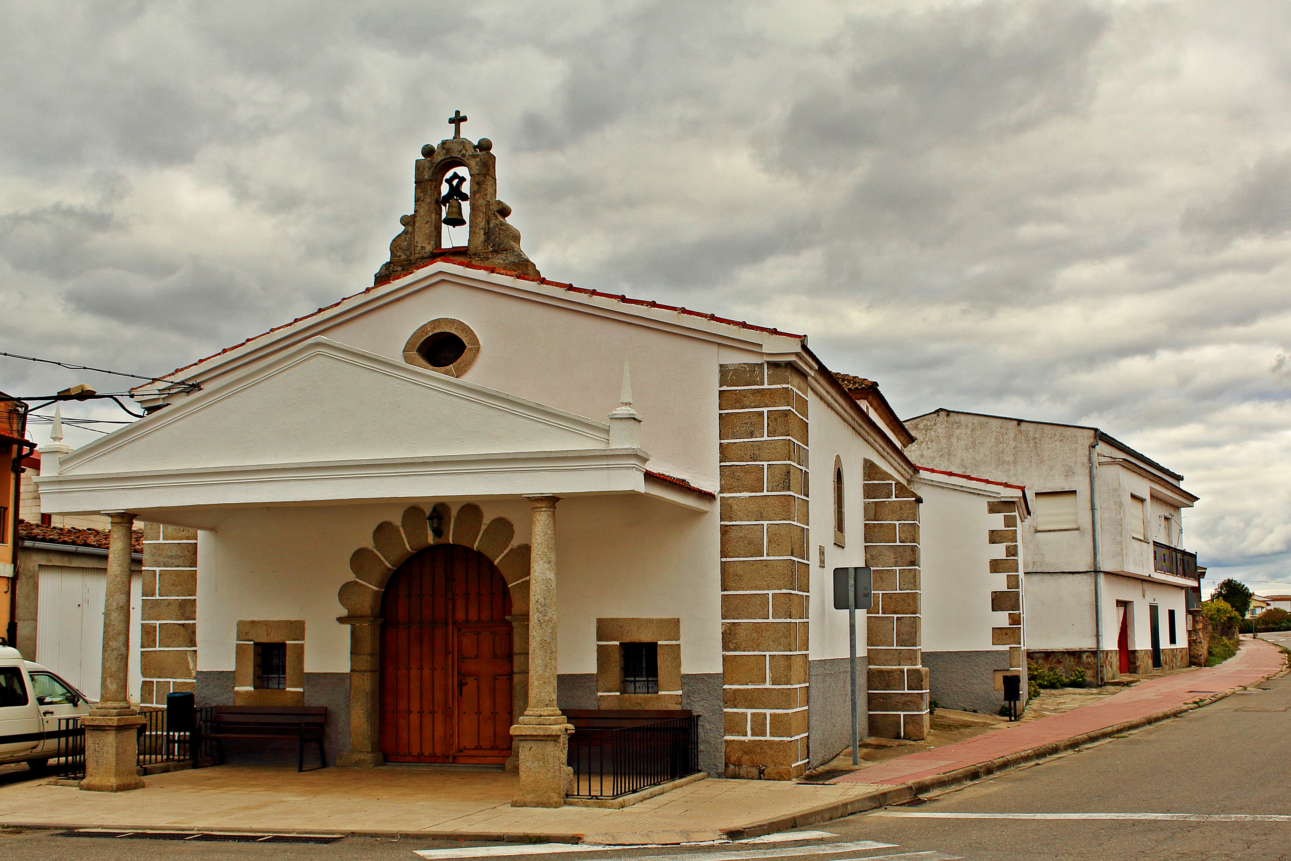 Ahigal, municipio de la comarca de Trasierra-Tierra de Granadilla, provincia de Cáceres